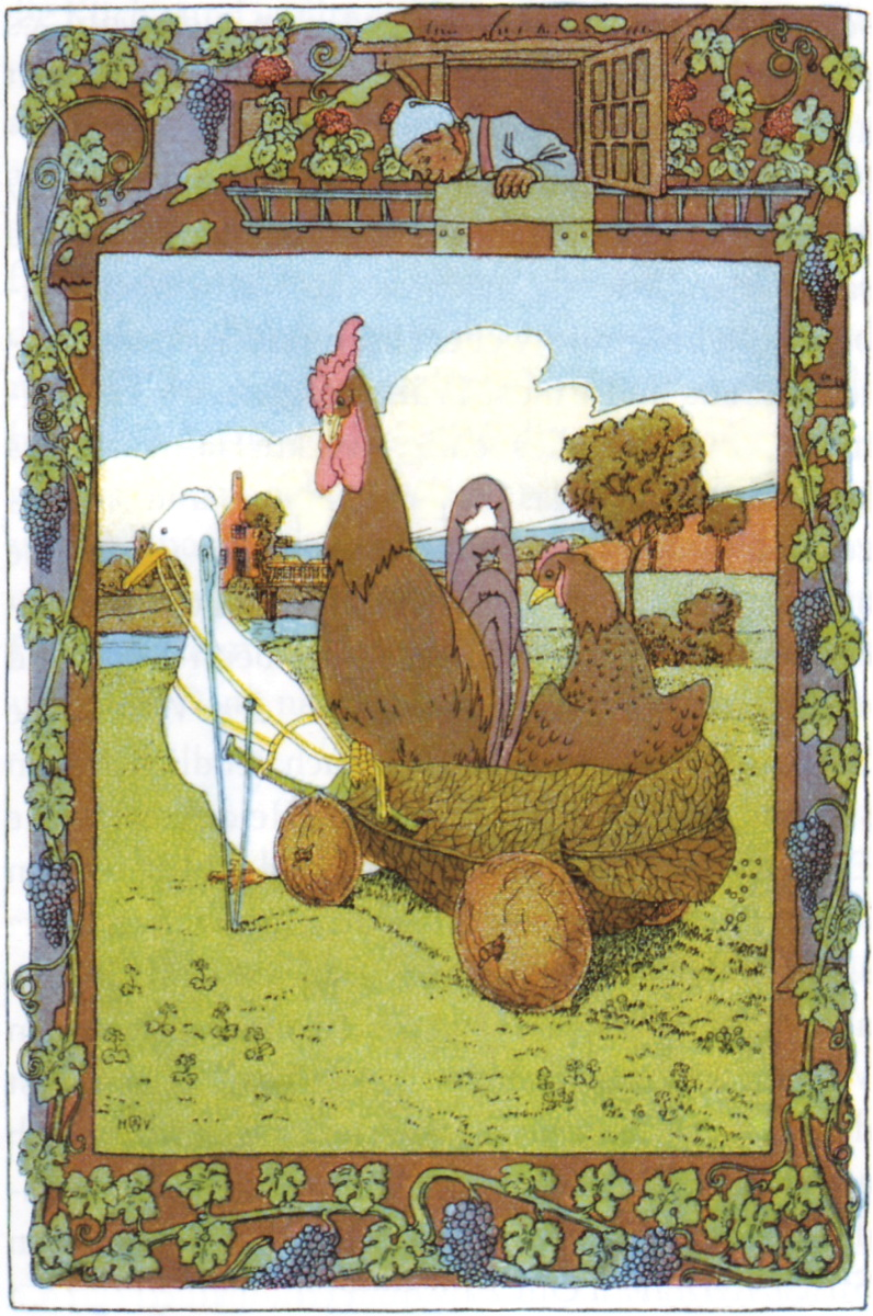 Illustration des Grimm'schen Märchens „Das Lumpengesindel“ (KHM 10) von Heinrich Vogeler